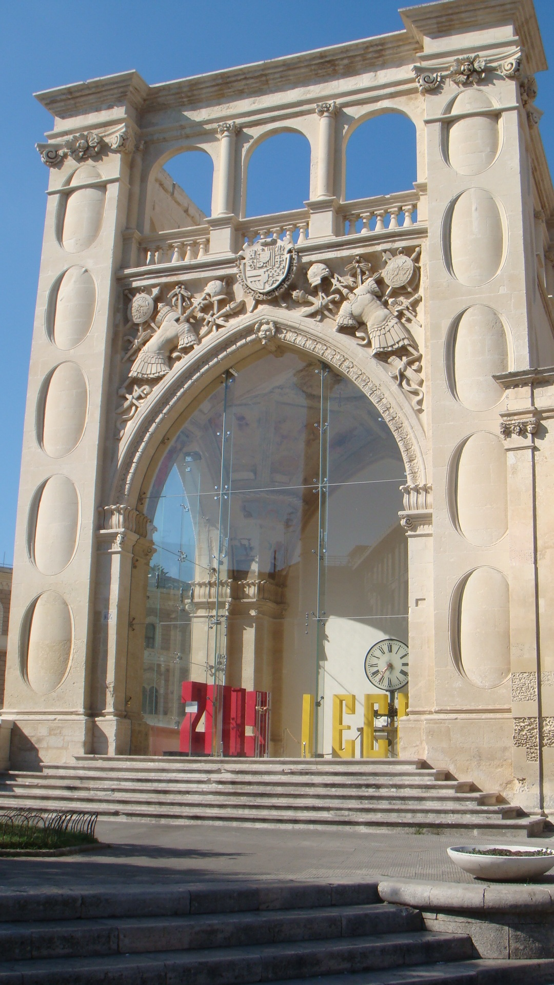 Lecce